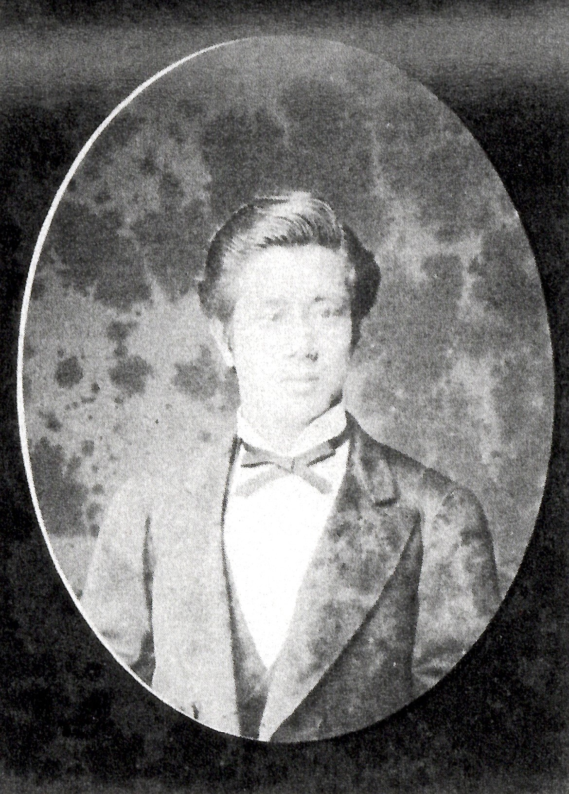 広幡忠朝の肖像写真。